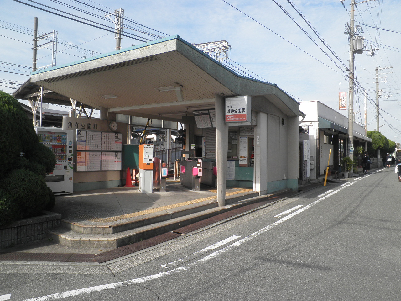 浜寺公園駅の東口駅舎